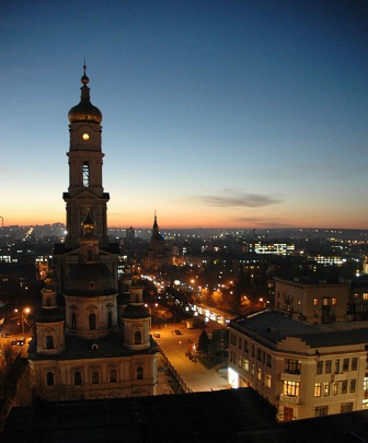 Вид на Покровский собор